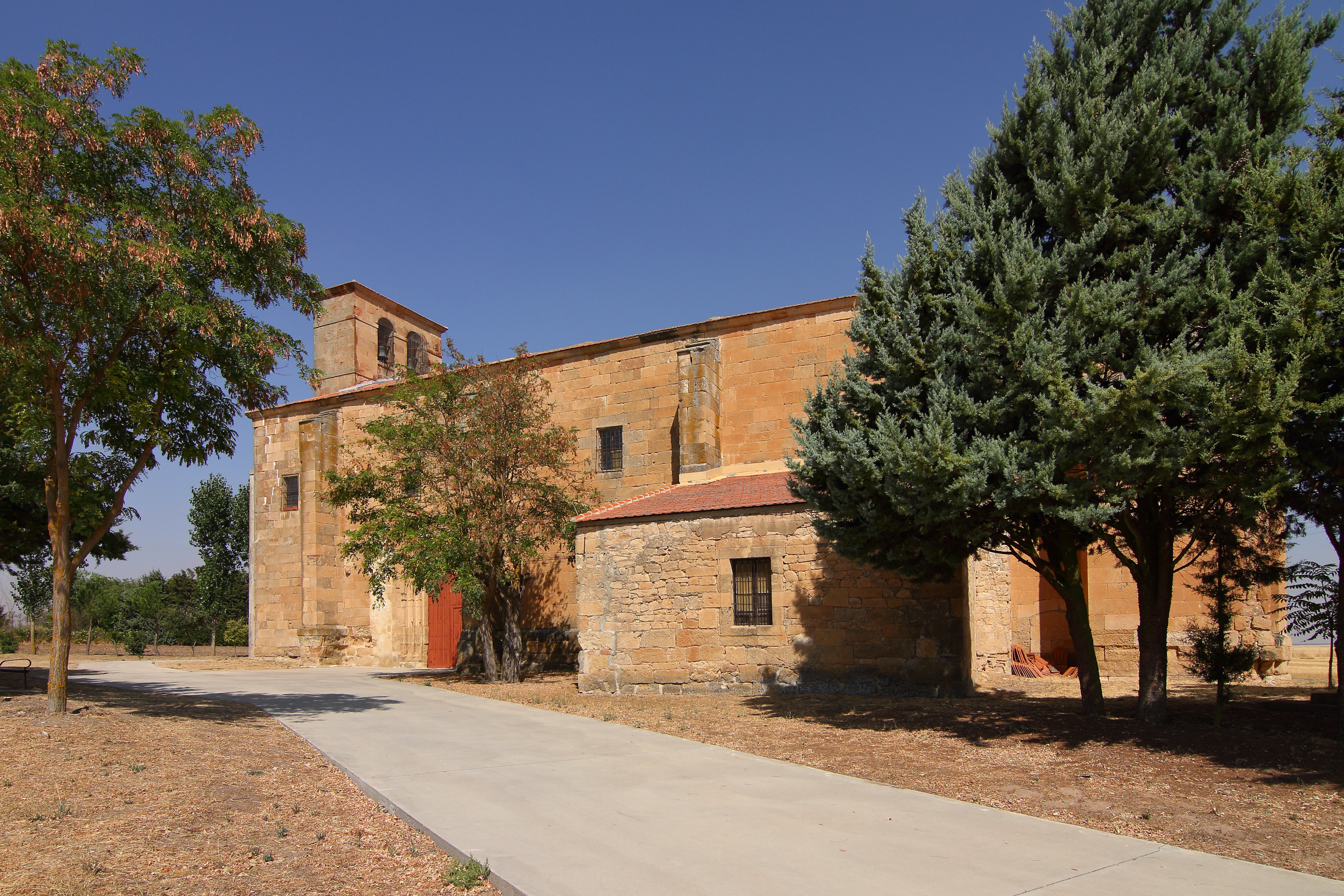 Iglesia parroquial de Arcediano